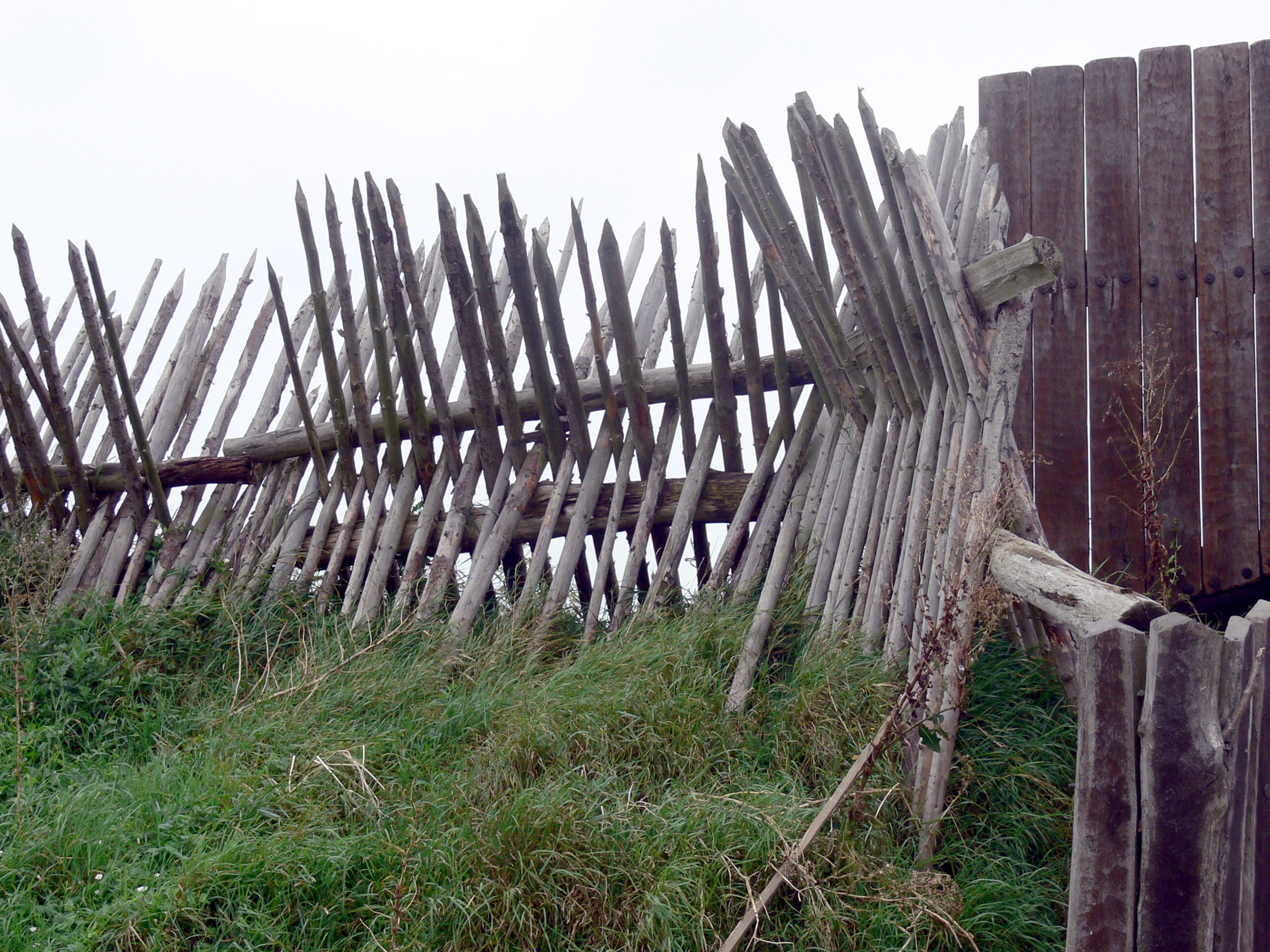 Wikinger Museum Foteviken in Skanör. Palisaden um das Dorf.